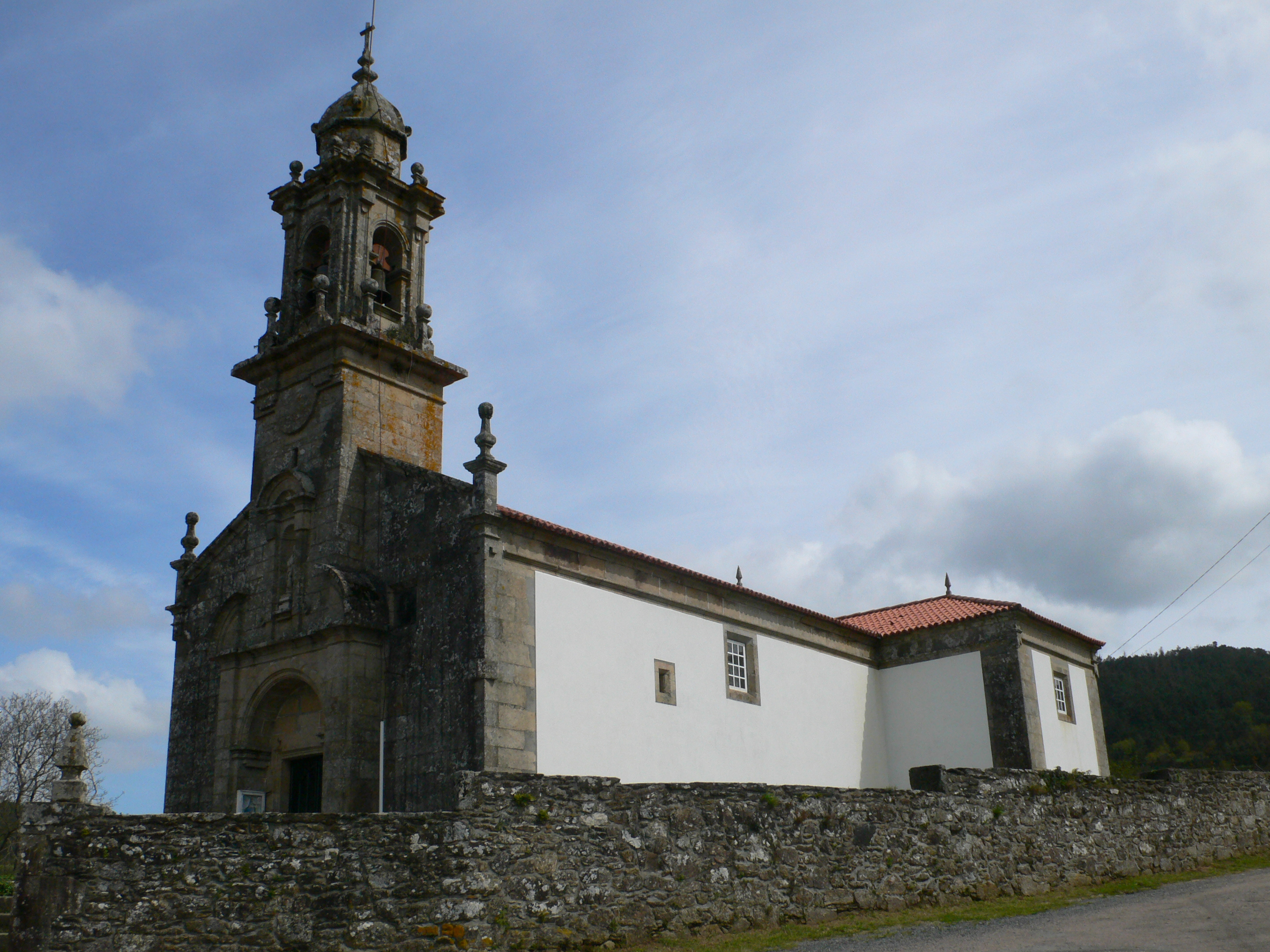 Igrexa de San Xoán de Carbia, Vila de Cruces